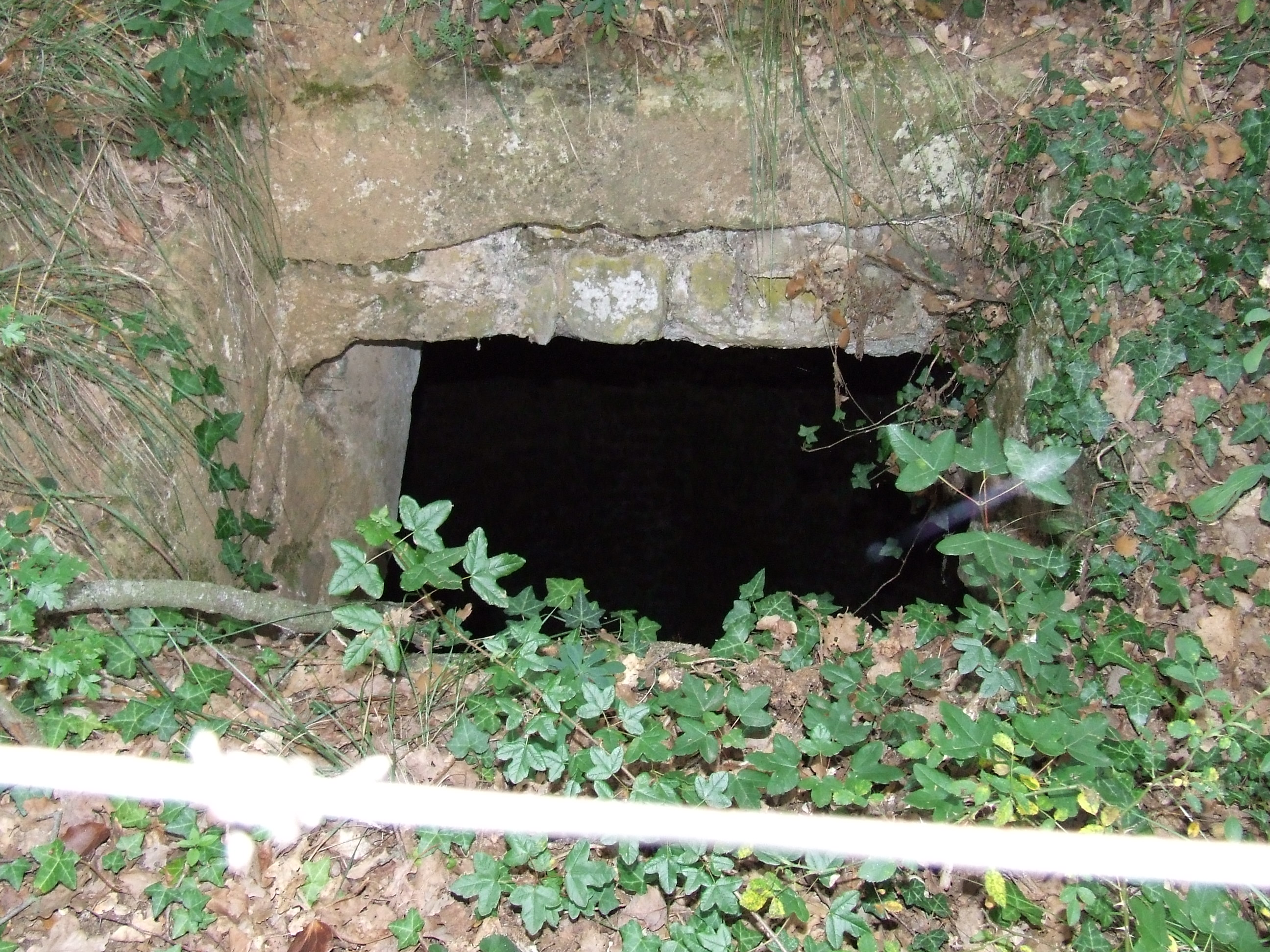 Poua de la Torrassa dels Moros (Castellcir, Moianès)